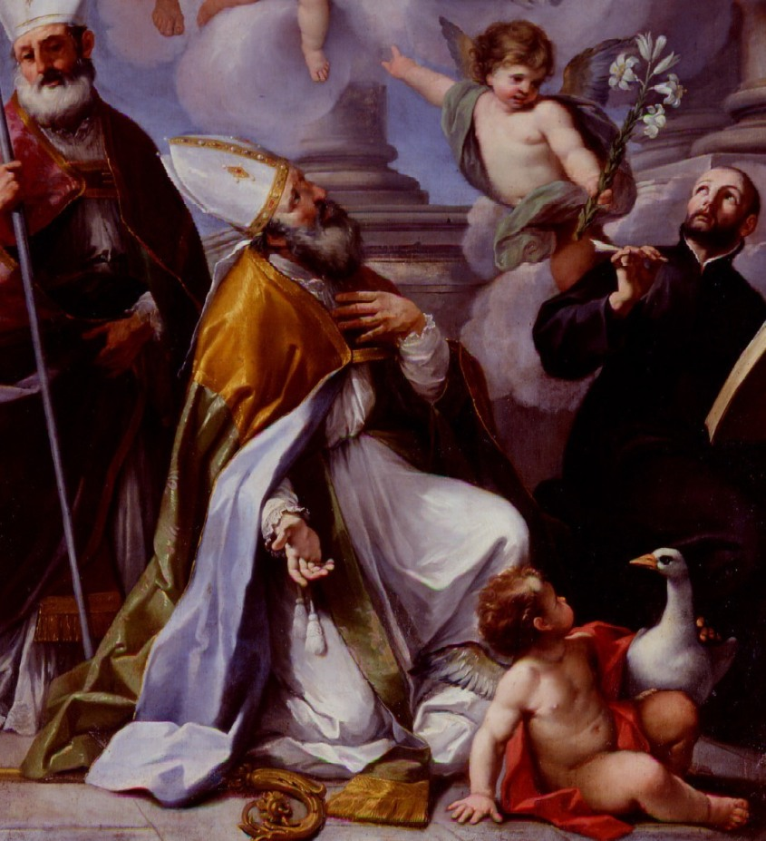 San Geronzio. Particolare dalla pala di Luigi Garzi del 1704 - Basilica Cattedrale di Cagli